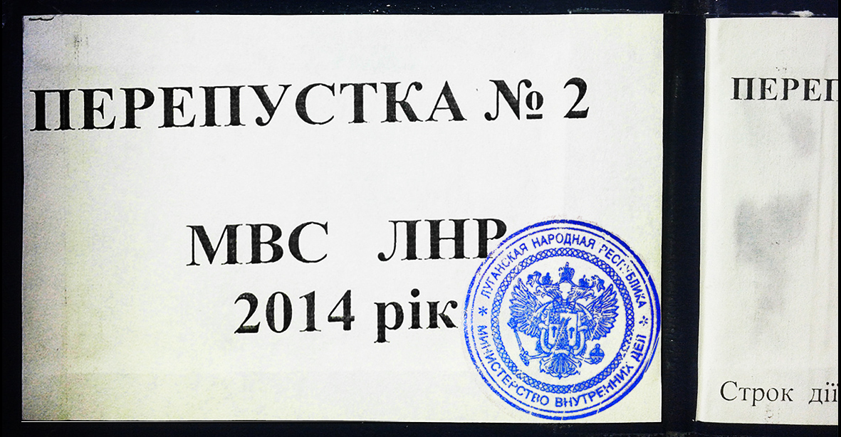 Перепустка "МВС ЛНР" з "гербовою" печаткою. На печатці надпис російською, на перепустці - українською